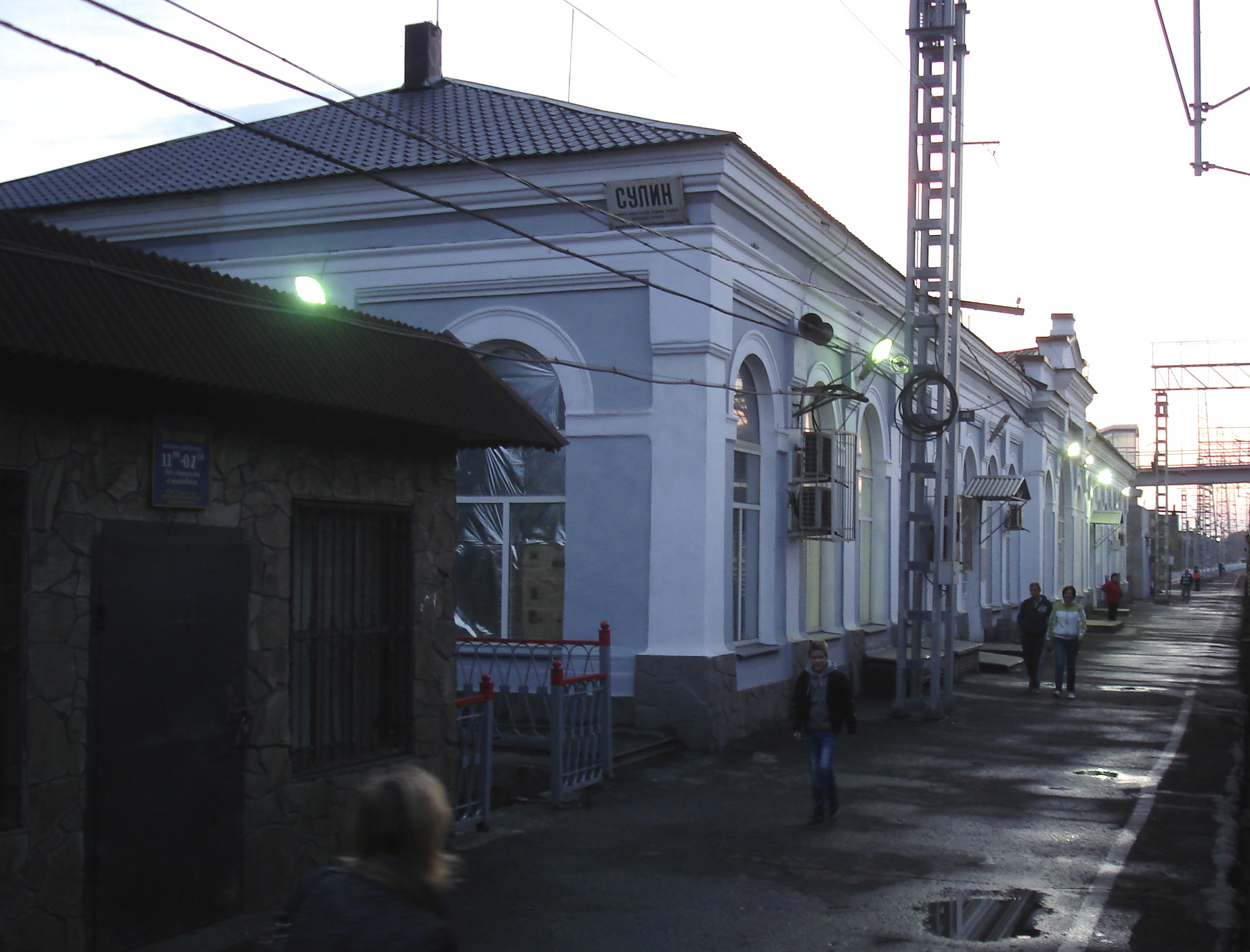 Здание ЖД-станции Сулин